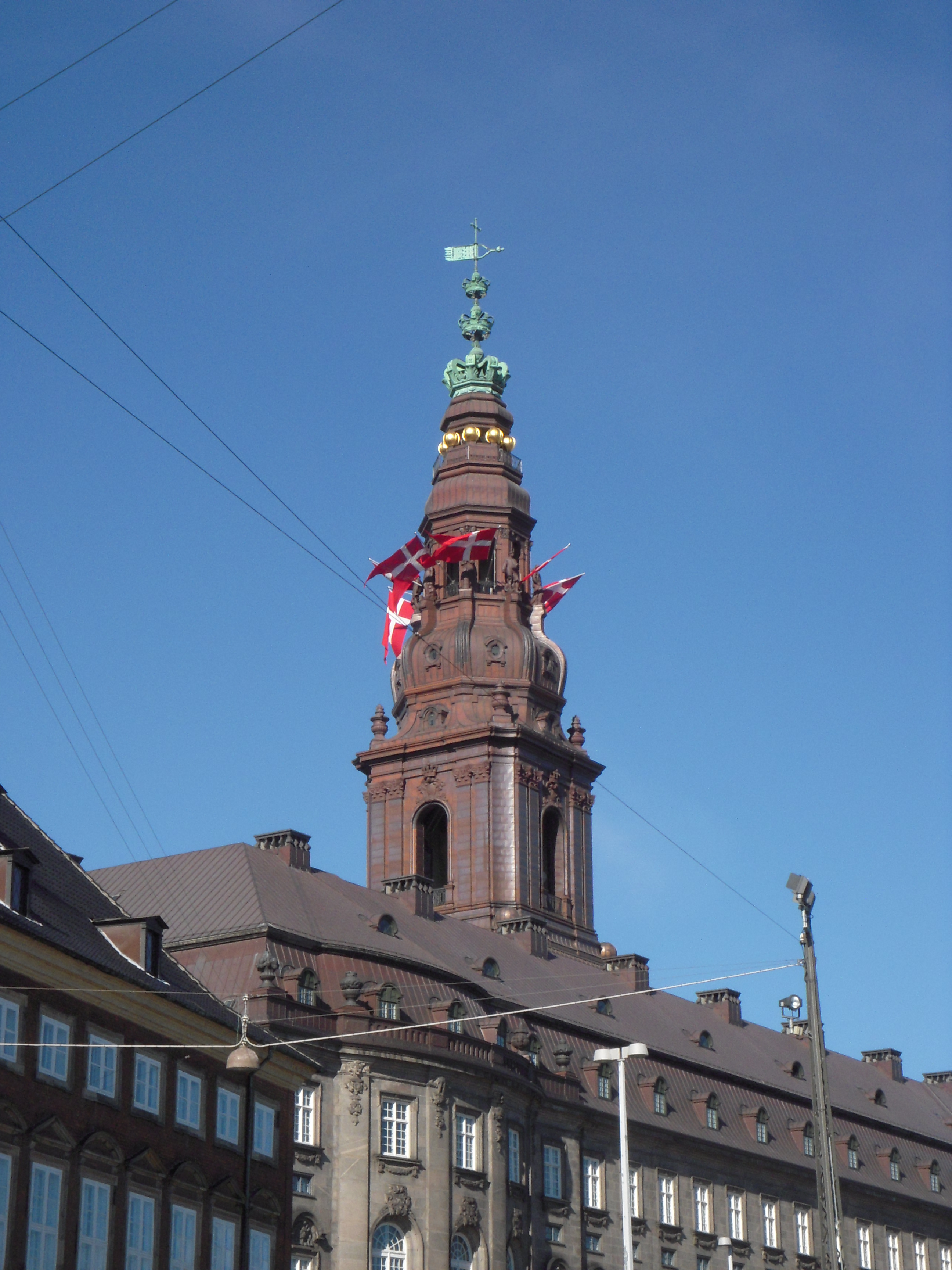 Christiansborg Slot på flagdagen for udsendte soldater. 5. september 2010.